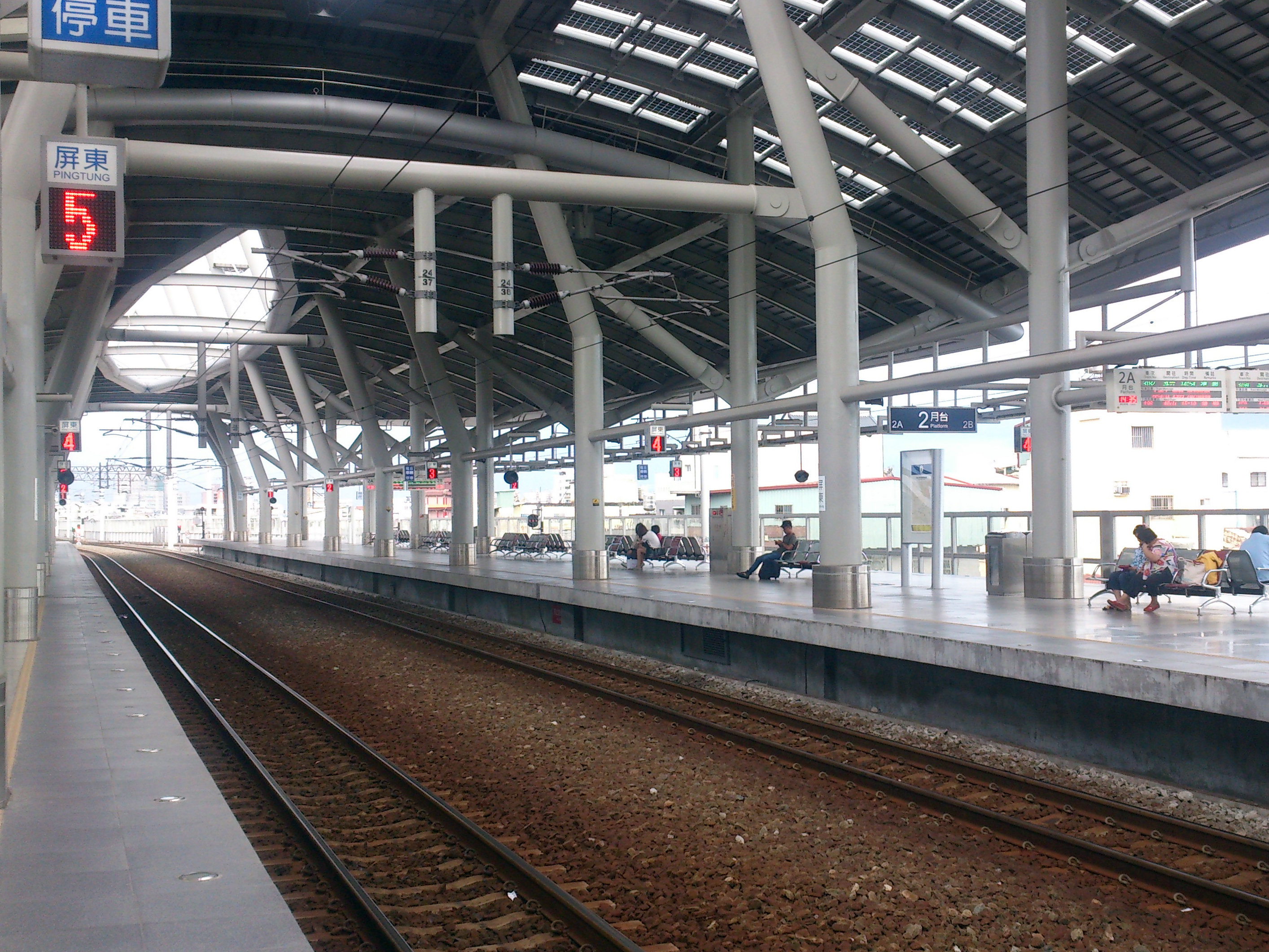 屏東車站月台層